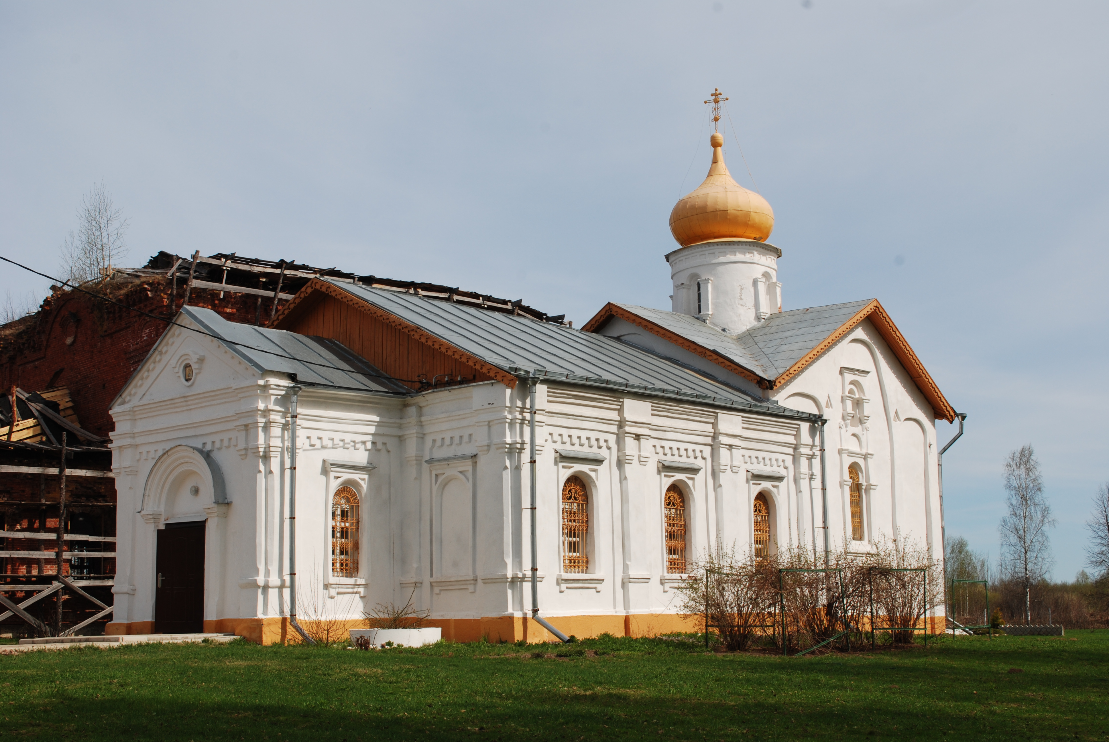 Монастырь Никольский Косинский (Новгородская область, Старая Русса, деревня Косино)